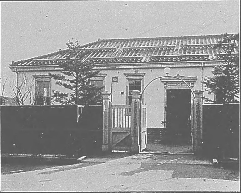 説明文に「高岡市御馬出町に在り越中西部の一市四郡及び能登三郡を管轄す」とあり